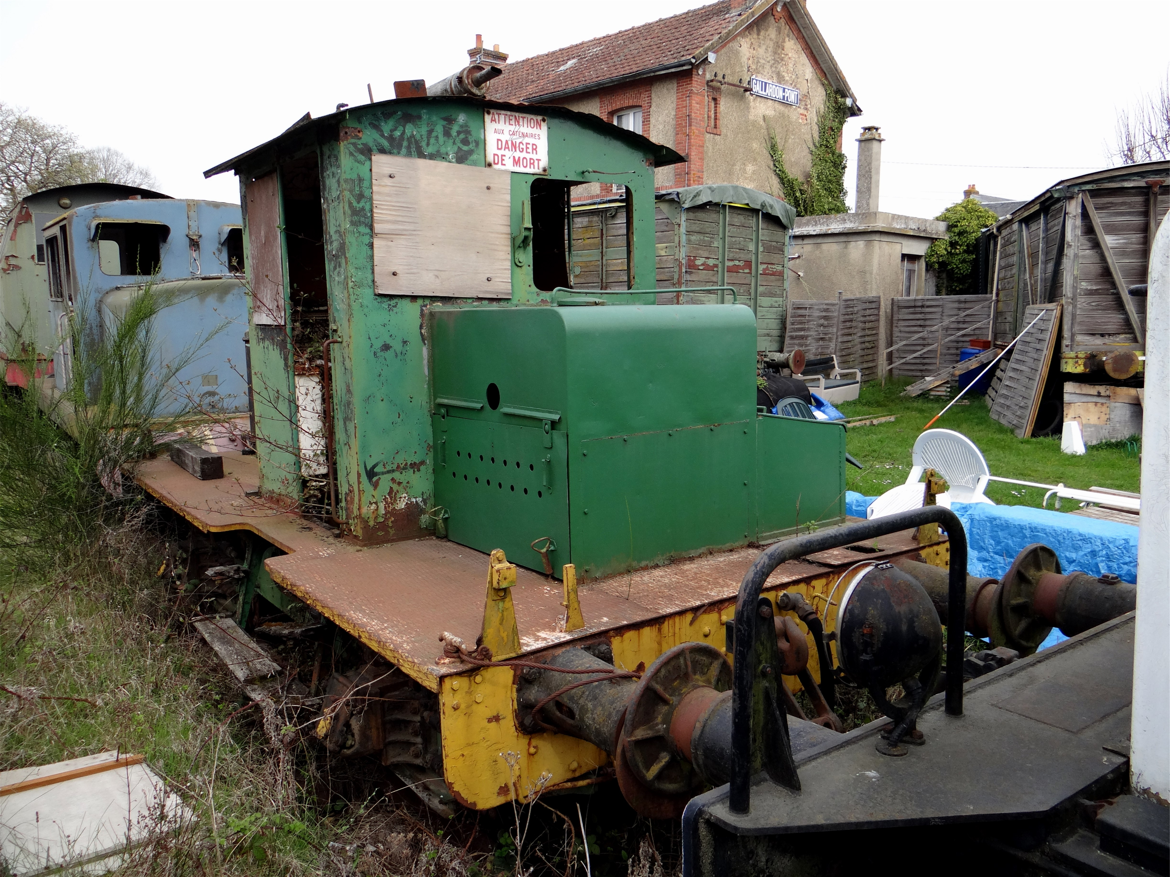 Ancienne locomotive diesel en gare de Gallardon-Pont à Bailleau-Armenonville, Eure-et-Loir, France.